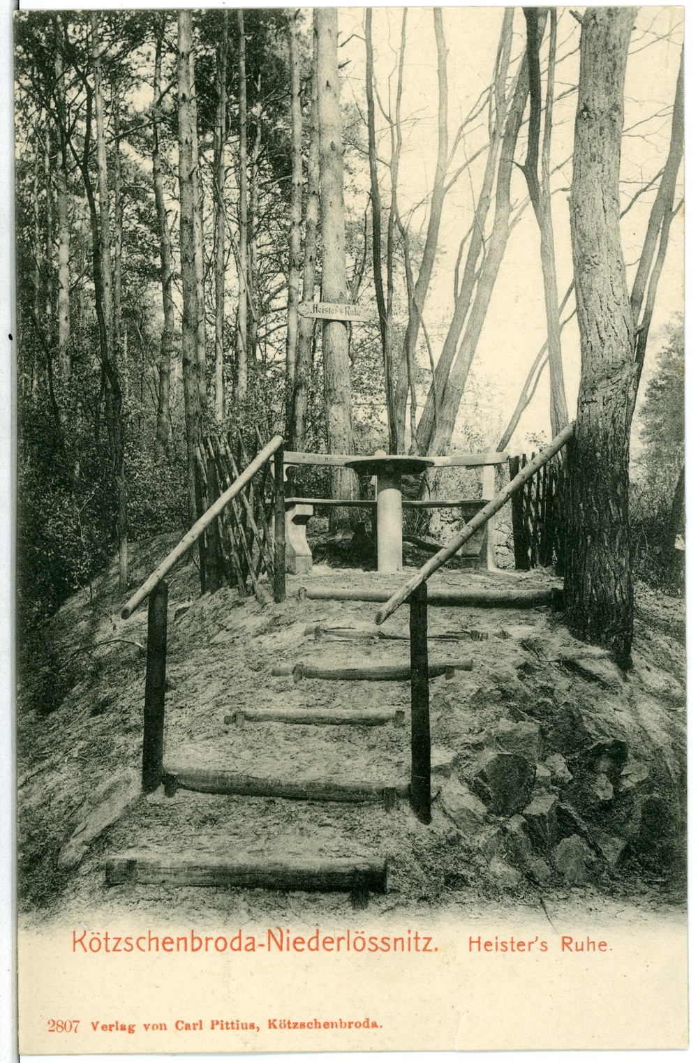 Kötzschenbroda; Niederlößnitz, Heisters Ruh This postcard is from publisher Brück & Sohn in Meißen ( postcard has a unique number 02807 and is available in a higher resolution at the publisher. This images was uploaded in a cooperation project between Wikipedians and the publisher.